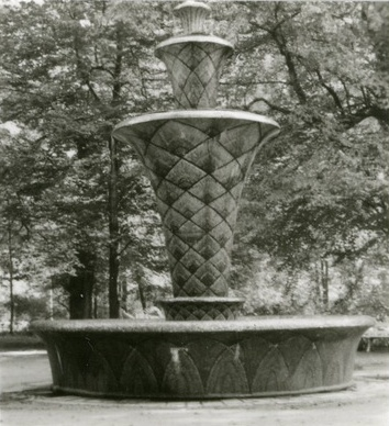 Ansicht des Mosaikbrunnens 1979